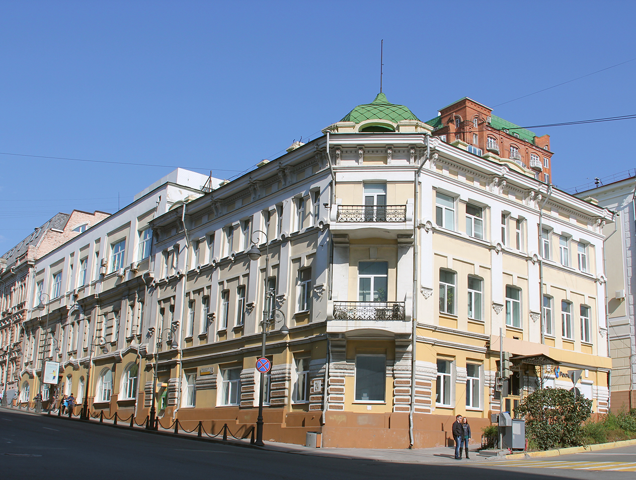 Здание владивостокского телеграфа (Приморский край, Владивосток, Океанский проспект, 24)